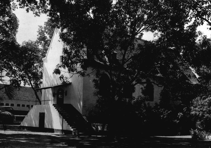 Foto. Kerkje in Fort Rotterdam te Makassar op Celebes, 1924